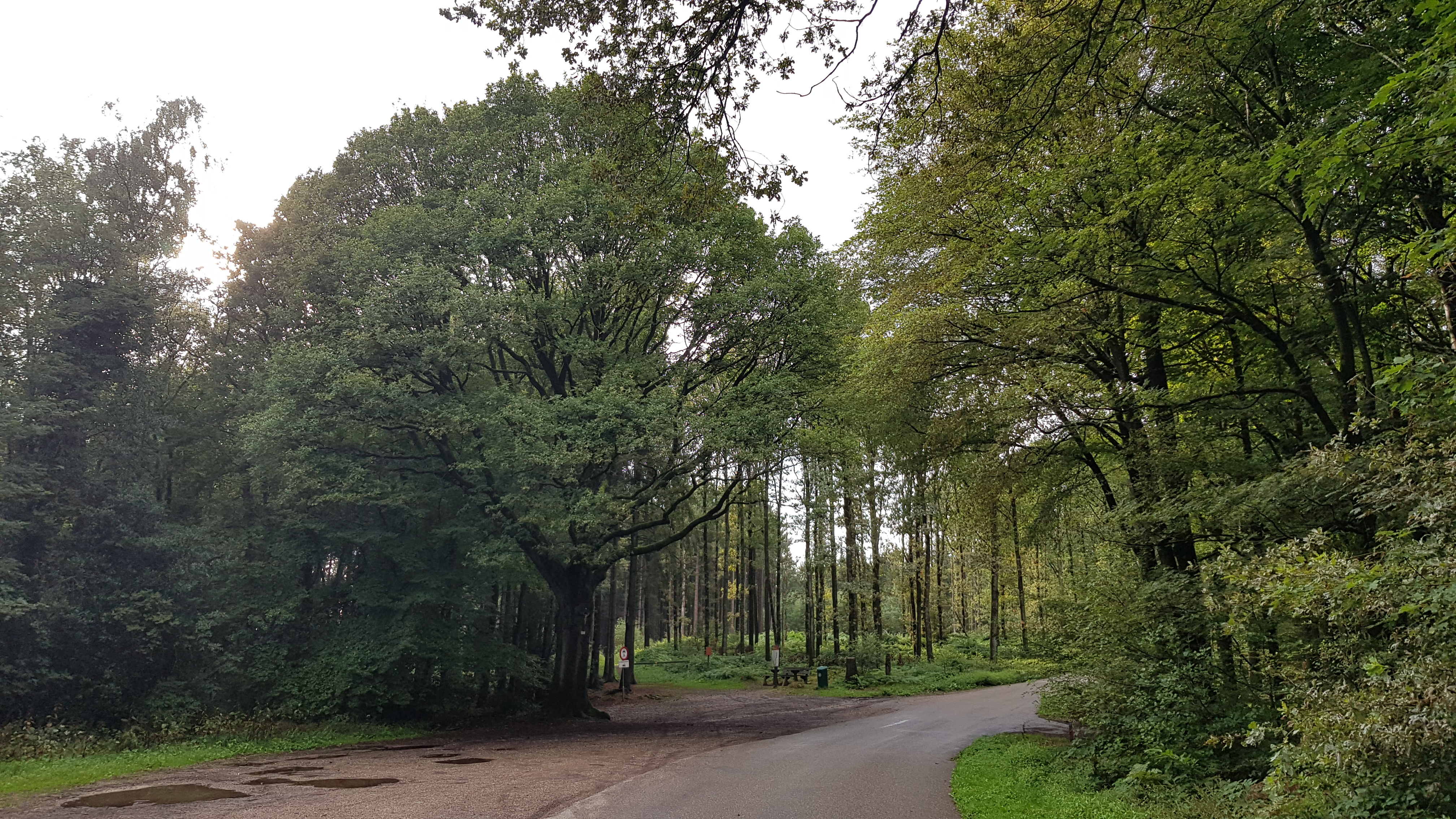 Zevenwegen in het Vijlenerbos, Nederland